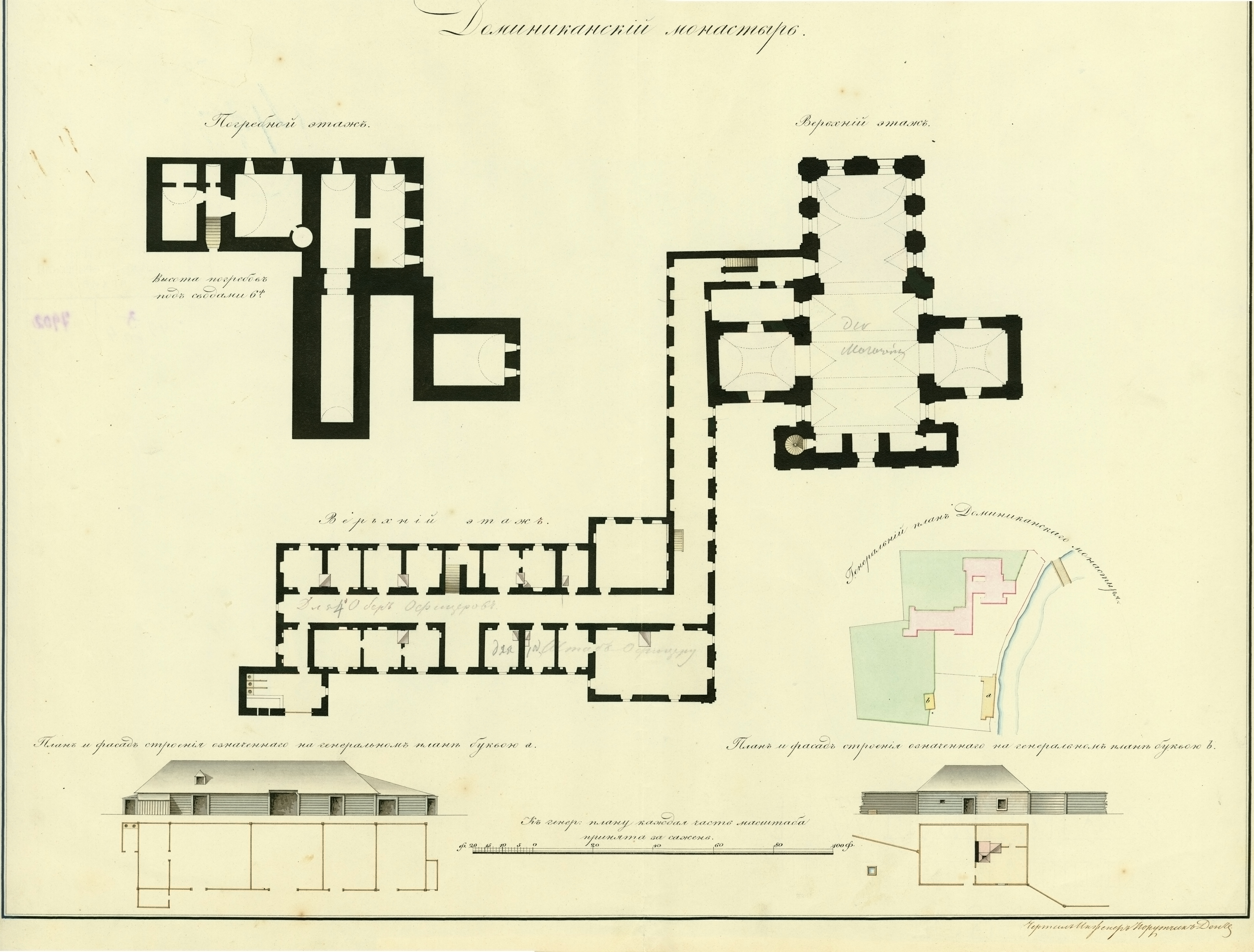 Беларуская (тарашкевіца): Берасьце (Bieraście), Заўгрынецкае прадмесьце (Zaŭhrynieckaje pradmieściе). Касьцёл Сьвятой Соф'і і кляштар дамініканаў